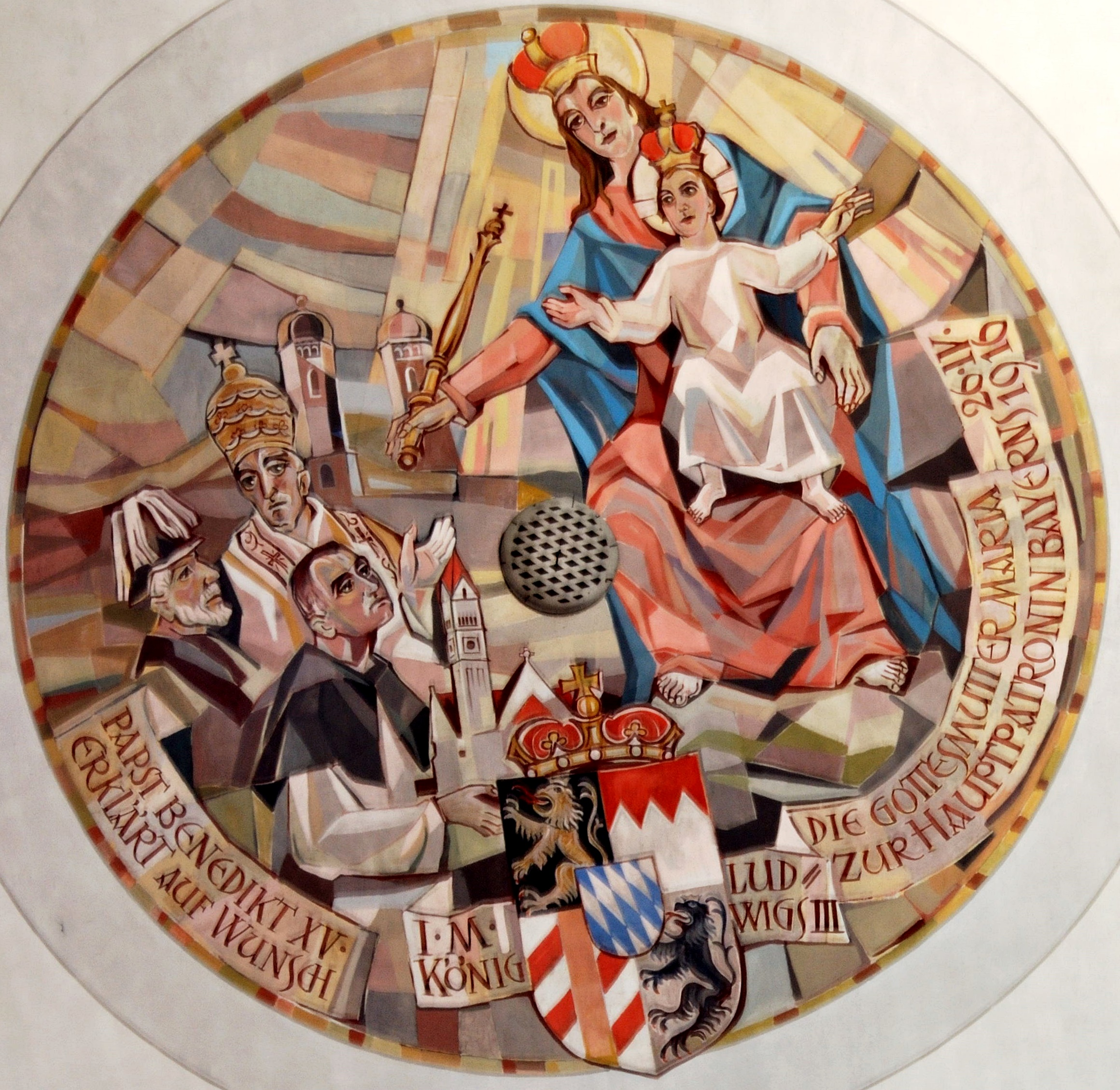 Patrona Bavariae Stifterbild, Kirche Maria Schutz (Pasing), Ausschnitt aus Wikicommons Bild